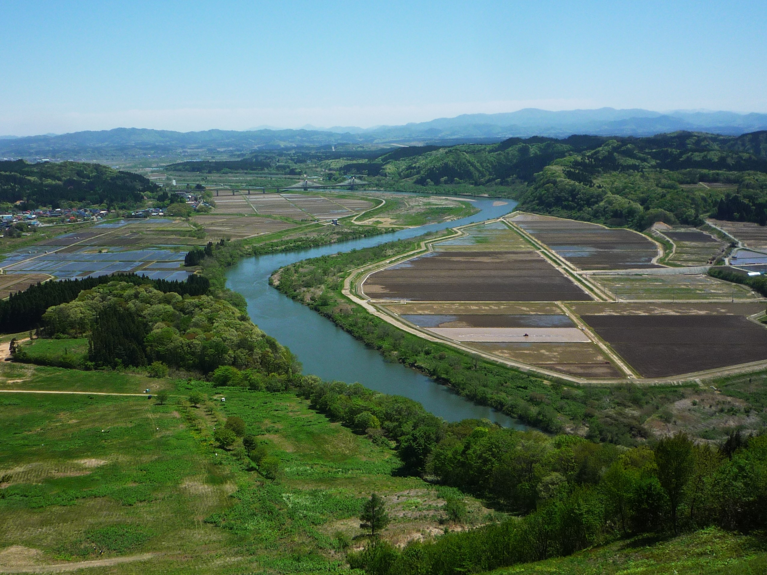 国道７号線沿いに位置する、標高187ｍの薬師山より米代川上流方向を望む